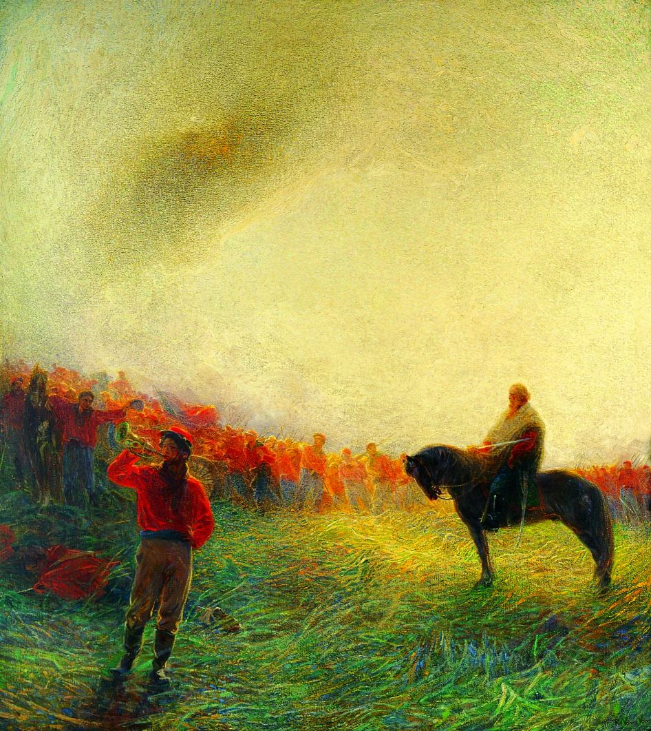 Ritratto di Garibaldi e garibaldini